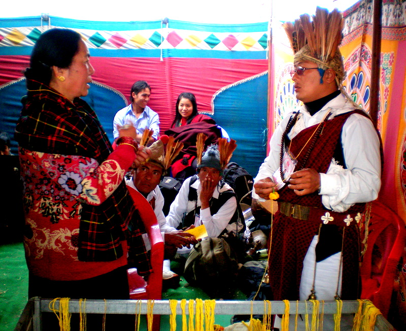 नेपाली: लामा बाजेले ल्होसार पूजापछि धागो बानी दिएर आशिष दिदै